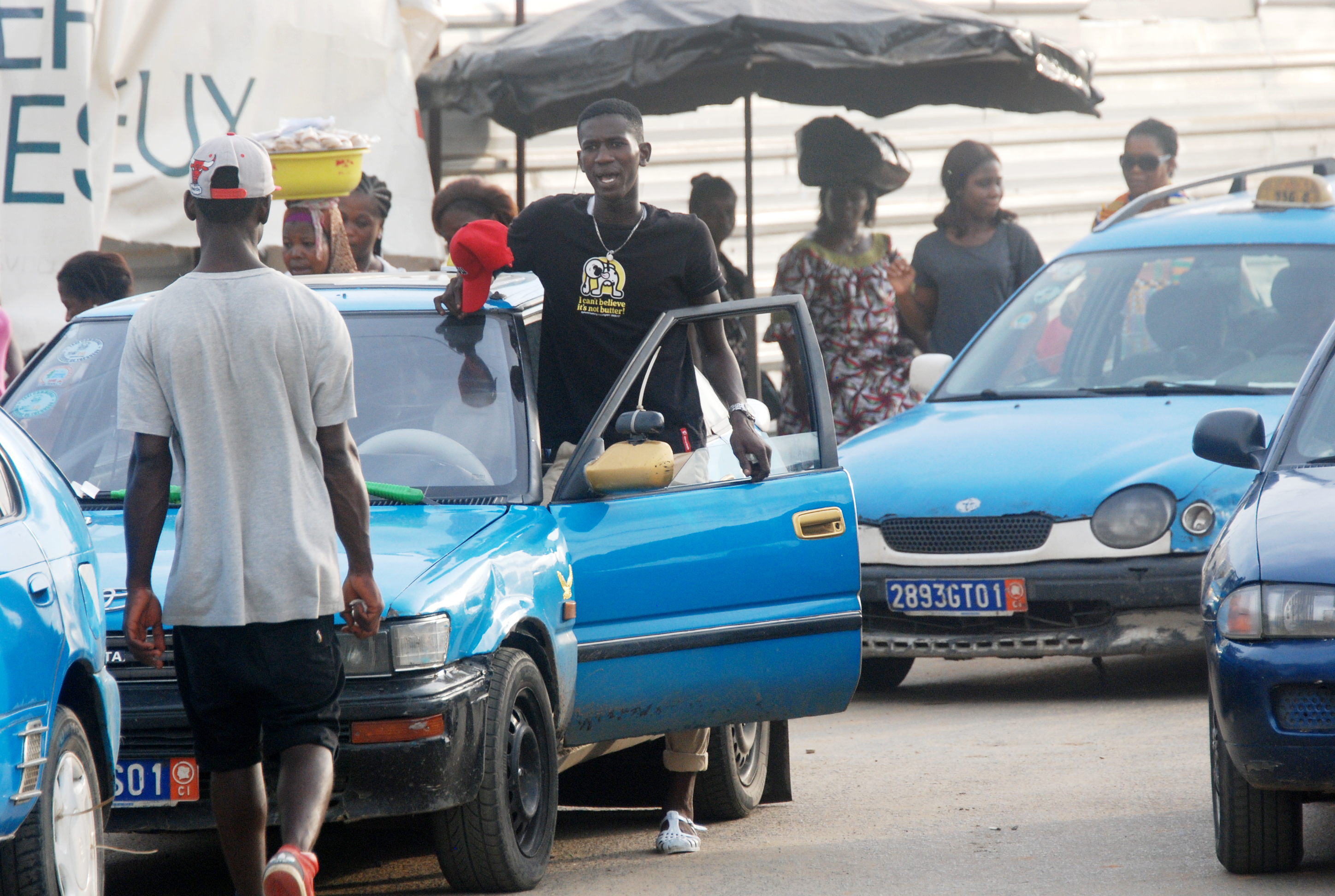 chauffeur de taxis dans la ville d'Abidjan This is an image of "African people at work" from Ivory Coast